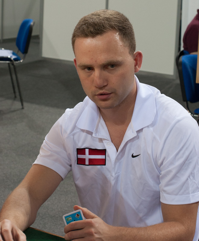 Dennis Bilde of Denmark